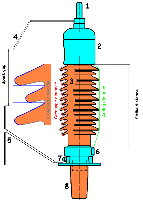 De onderdelen van een doorvoering met aanduiding van enkele karakteristieke afstanden Top aansluiting (koper of aluminium of met metalisatie) Kop van de doorvoering (gietaluminium) Porselein enveloppe Bovenste staafvonkbrug Onderste staafvonkbrug Voet van de doorvoering Meetplug voor verlieshoek meting van de condensator Olie-deel met epoxy afscherming Enkele afstanden zijn ook belangrijk: "strike distance" is de rechte afstand fase-aarde dus door het porselein "arcing distance" is de kortste afstand fase-aarde dus over het porselein kruipweg is de afstand fase-aarde over het oppervlak van de porselein beschermde kruipweg is de kruipweg die onder slagregen van 90° niet nat wordt